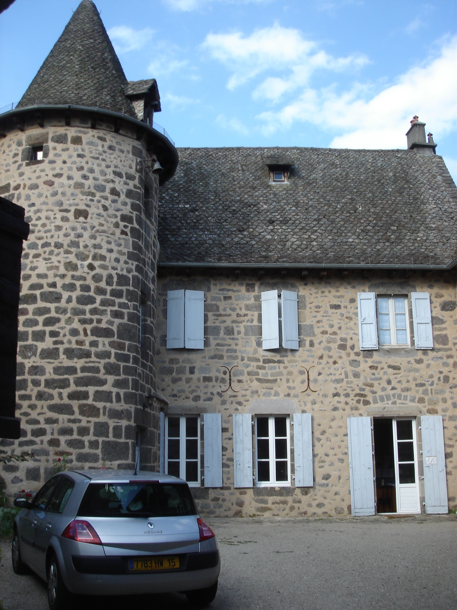 Ancienne école Saint-Antoine, devenu presbytère de Vic